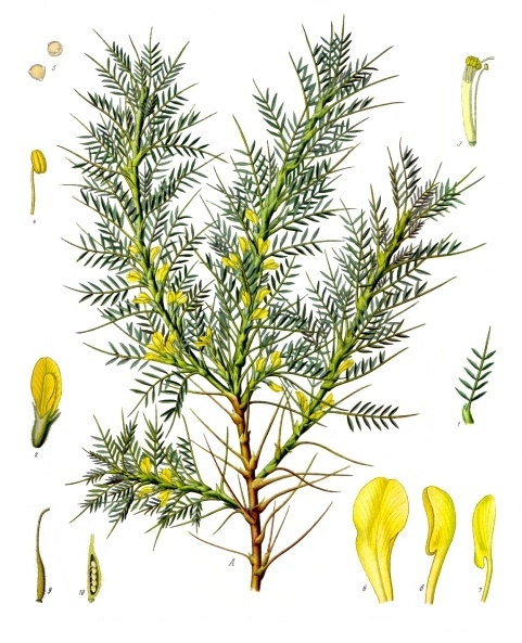 Tragant. A blühender Zweig des Astragalus abscendens Boiss., natürl. Grösse; 1 Blatt, desgl.; 2 Blüthe, vergrössert; 3 Staubgefässe mit Griffel, desgl.; 4 einzelnes Staubgefäss, desgl.; 5 Pollen, desgl.; 6 Fahne, desgl.; 7 Flügel, desgl.; 8 Schiffchen, desgl.; 9 Stempel, desgl.; 10 Fruchtknoten im Längsschnitt, desgl.